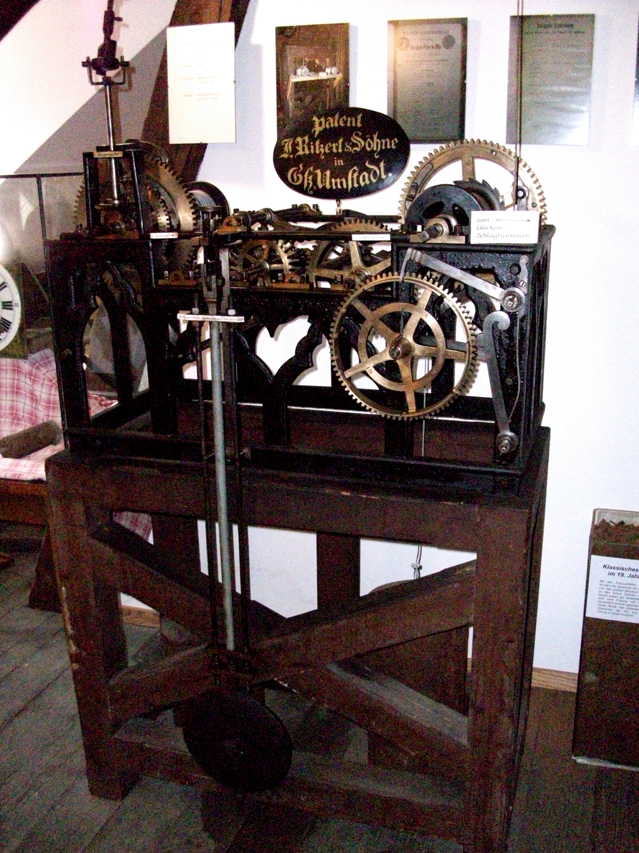 restaurierte Turmuhr der Umstädter Fa. Ritzert ausgestellt im Gruberhof